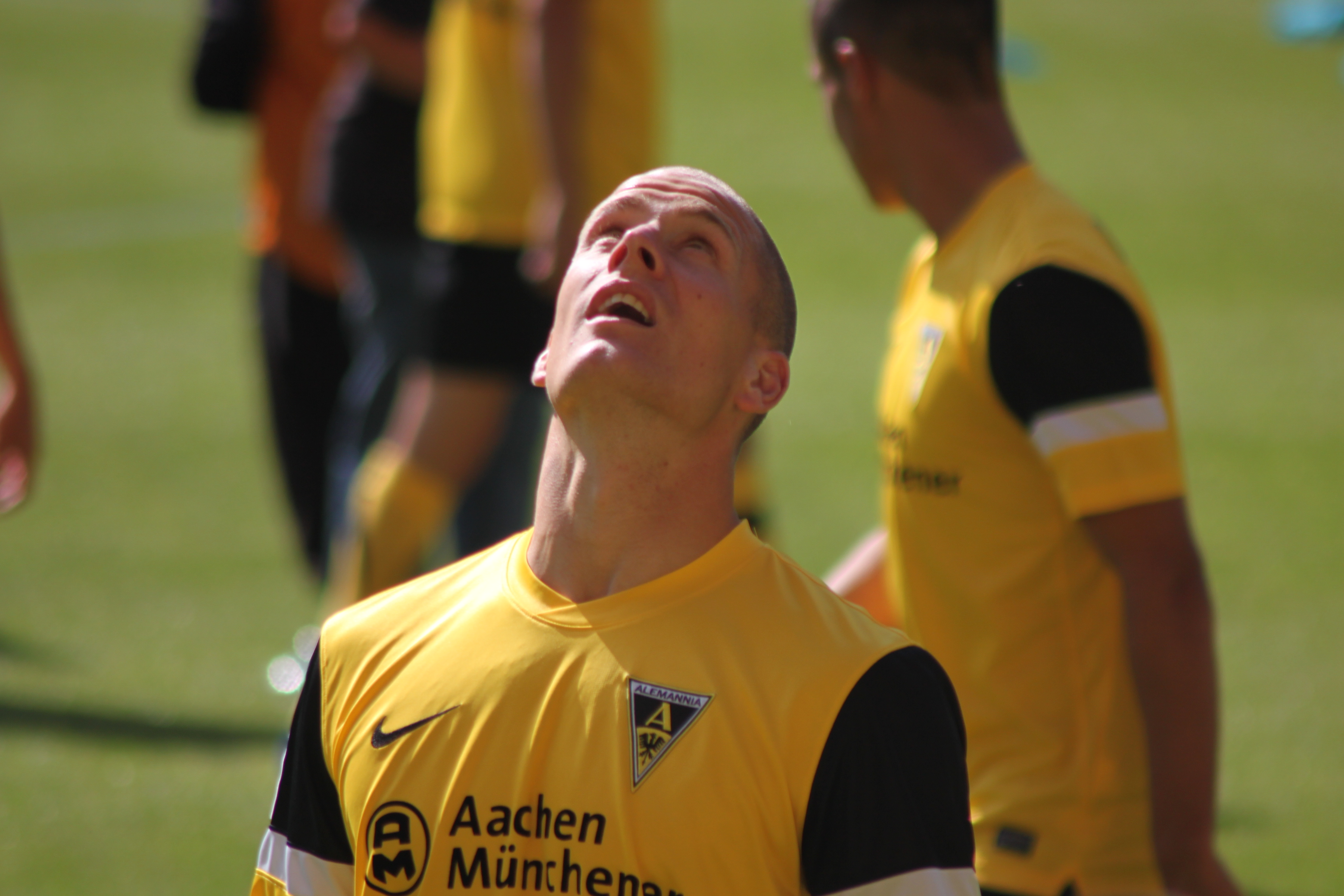 Bas Sibum bei der Saisoneröffnung der Alemannia im Juli 2011.